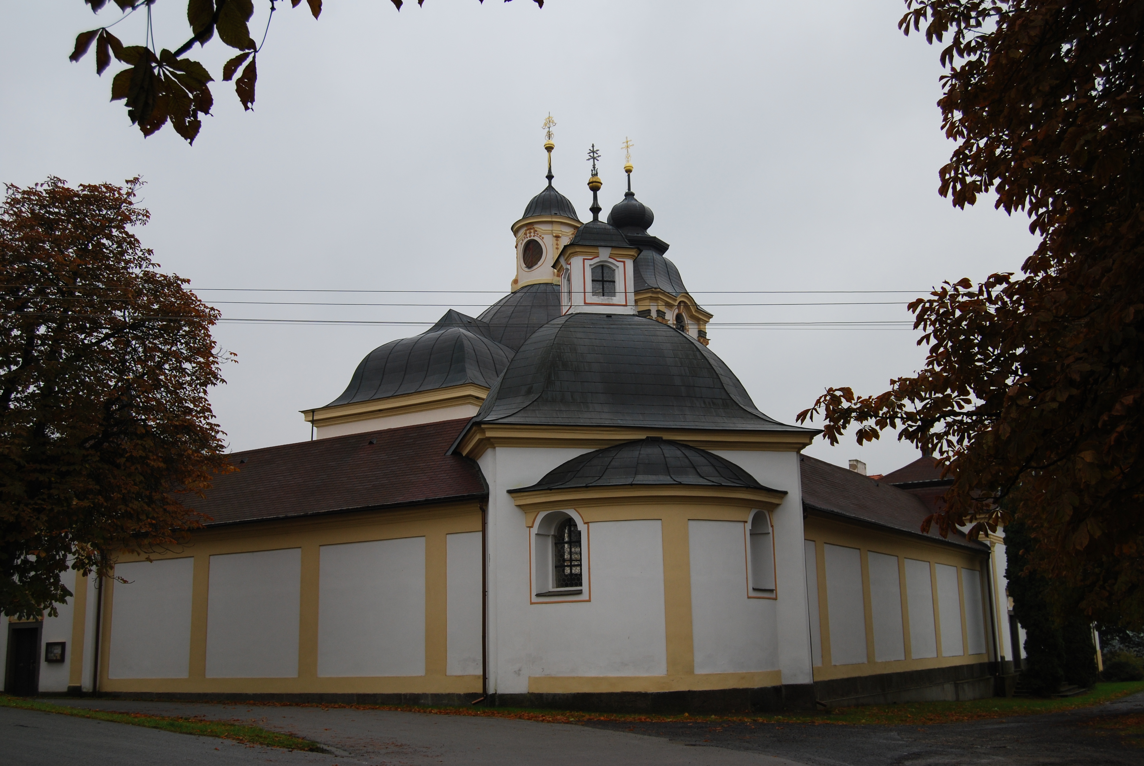 Kostel Jména Panny Marie. Celkový pohled. Sepekov. Okres Písek. Česko.